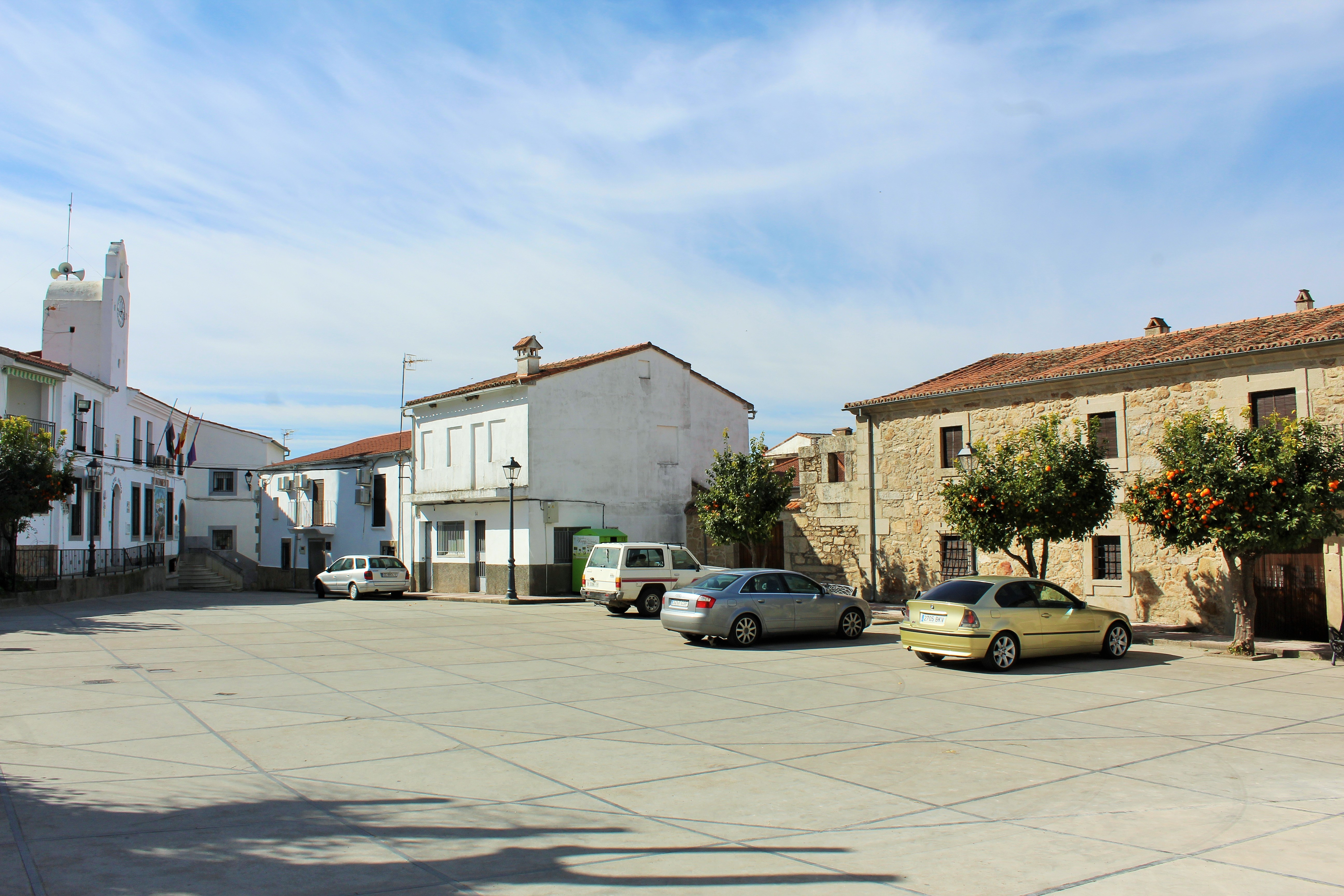 Plaza principal con el ayuntamiento y casa señorial